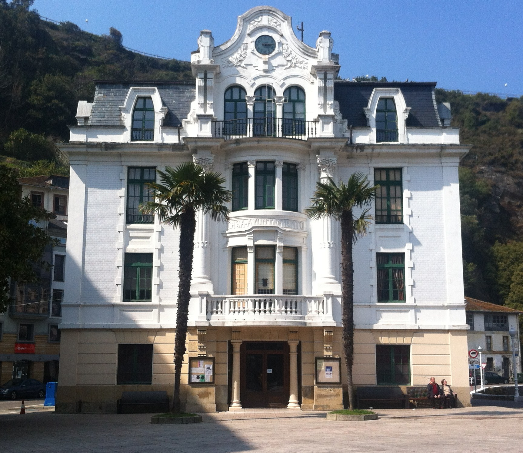 Casa conceyu de Valdés, en L.luarca (Asturies).